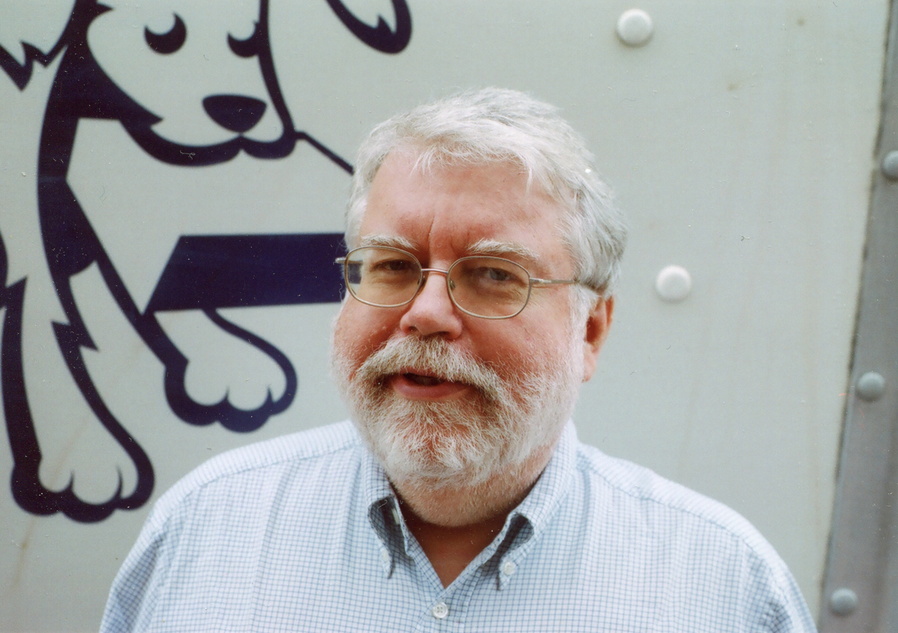 Foto di Leo Harrington